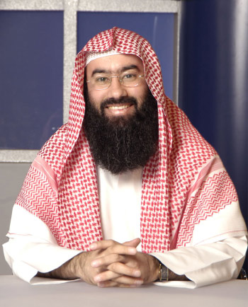 الشيخ : نبيل علي العوضي